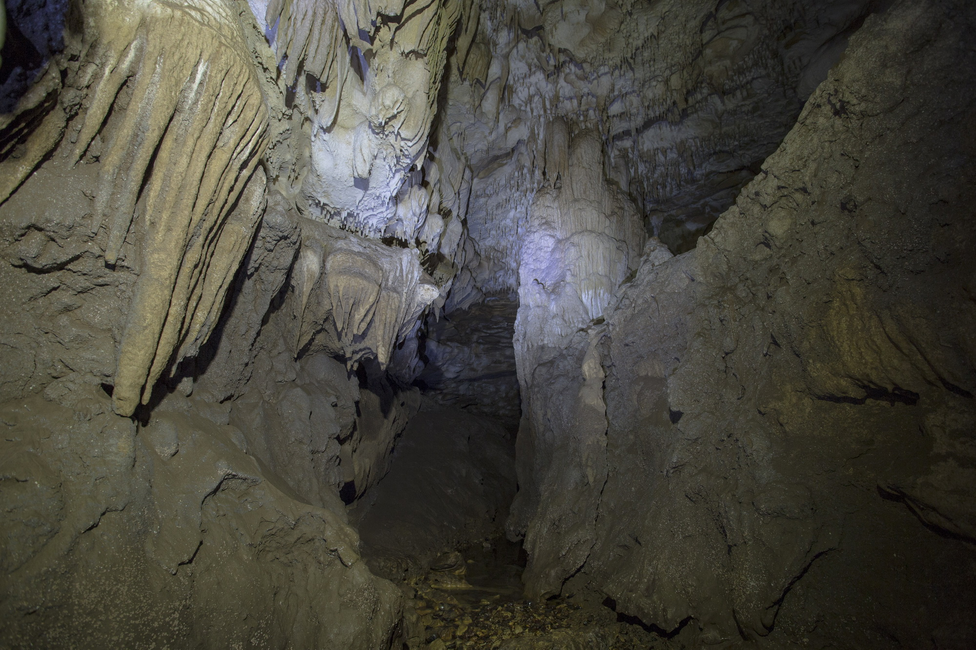 ჯორწყუს მღვიმის ბუნების ძეგლი ღირშესანიშნაობა: ბუნების ძეგლი წარმოადგენს ასხის კირქვულ მასივზე ზედაცარცული (ტურონ-დანიური) ასაკის თხელ შრეებრივ კირქვებში, შრეთა დახრის საწინააღმდეგოდ გამომუშავებულ ორასრთულიან მღვიმეს, რომელიც იწყება ვრცელი შესასვლელი დარბაზით და რომელსაც 4-5 მ სიგანისა დ 3-5 მ სიმაღლის დერეფანი აგრძელებს. მღვიმე შესასვლელიდან მე-100 მეტრზე ორ განშტოებას ინვითარებს. მაქსიმალური სიგრძე 276 მ-ია. ძირითადი მაგისტრალი - მეანდრული დერეფანი ბოლოში მოზრდილ დარბაზში გადადის, რომლის კედელზეც 30 მ სიგრძის მღვიმის მეორე სართულია იხსნება. შესასვლელთან ოდესღაც ჭერი ჩამონგრეულა. მღვიმეში სჭარბობს სტალაქტიტები, იშვიათია სტალაგმიტები; მდიდარია პლასტიკური თიხის 3,5 - 4 მ სისქის ნაფენებით. ჰაერის ტემპერატურა მღვიმის შესასვლელში 18° C-ია, 100 მ-ის სიგრძეზე – 11,6°C, ბოლოში კი 11,5°C. მღვიმეში გაედინება ნაკადი, რომელსაც უერთდება მეორე ნაკადი და 15 მ გავლის შემდეგ იგი მდ. ჯორწყუს მარცხენა მხარეს წყაროს სახით გამოდის. მღვიმე საინტერესოა დამახასიათებელი ფაუნით და პალეონტოლოგიური ნიმუშებით, გარდა ამისა, ერთ დროს ის ადამიანების სადგომსაც წარმოადგენდა. აქ ნაპონია მღვიმური დათვის, ფოცხვერის, დომბის და სხვა ცხოველების ძვლები. მდებარეობა: მარტვილის მუნიციპალიტეტი, სოფ. მეორე ბალდის ჩრდილო-აღმოსავლეთით, მდ. აბაშის მარცხენა შენაკადის ჯორწყუს ხეობა, 653 მეტრი ზღვის დონიდან. კოორდინატები: N42 30.620 E42 25.155